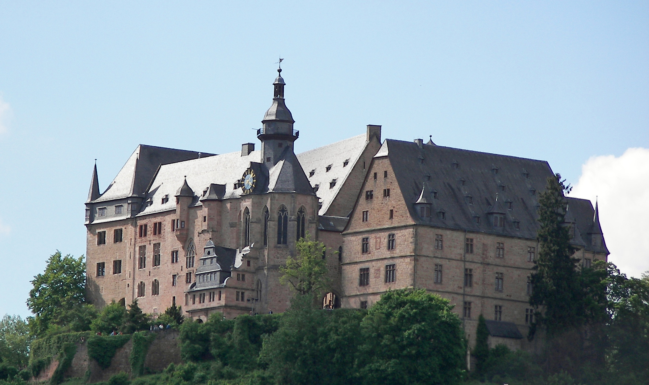 Marburger Schloss